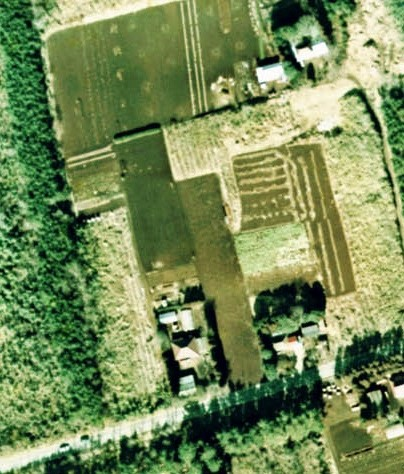 を加工したもの